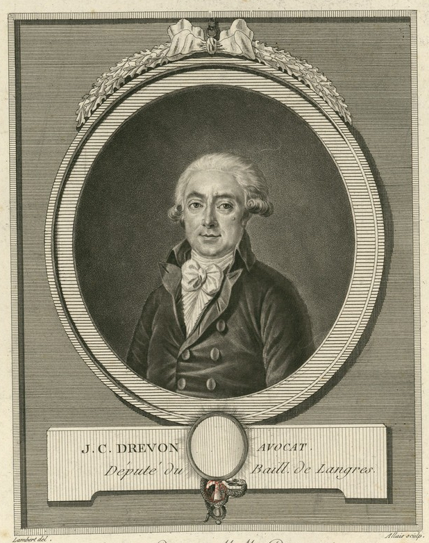 Joseph-Claude Drevon (1747-1823), Député suppléant du tiers aux Etats-Généraux de 1789 par le bailliage de Langres, membre de la Convention, député aux Cinq Cents, président du tribunal civil de Langres